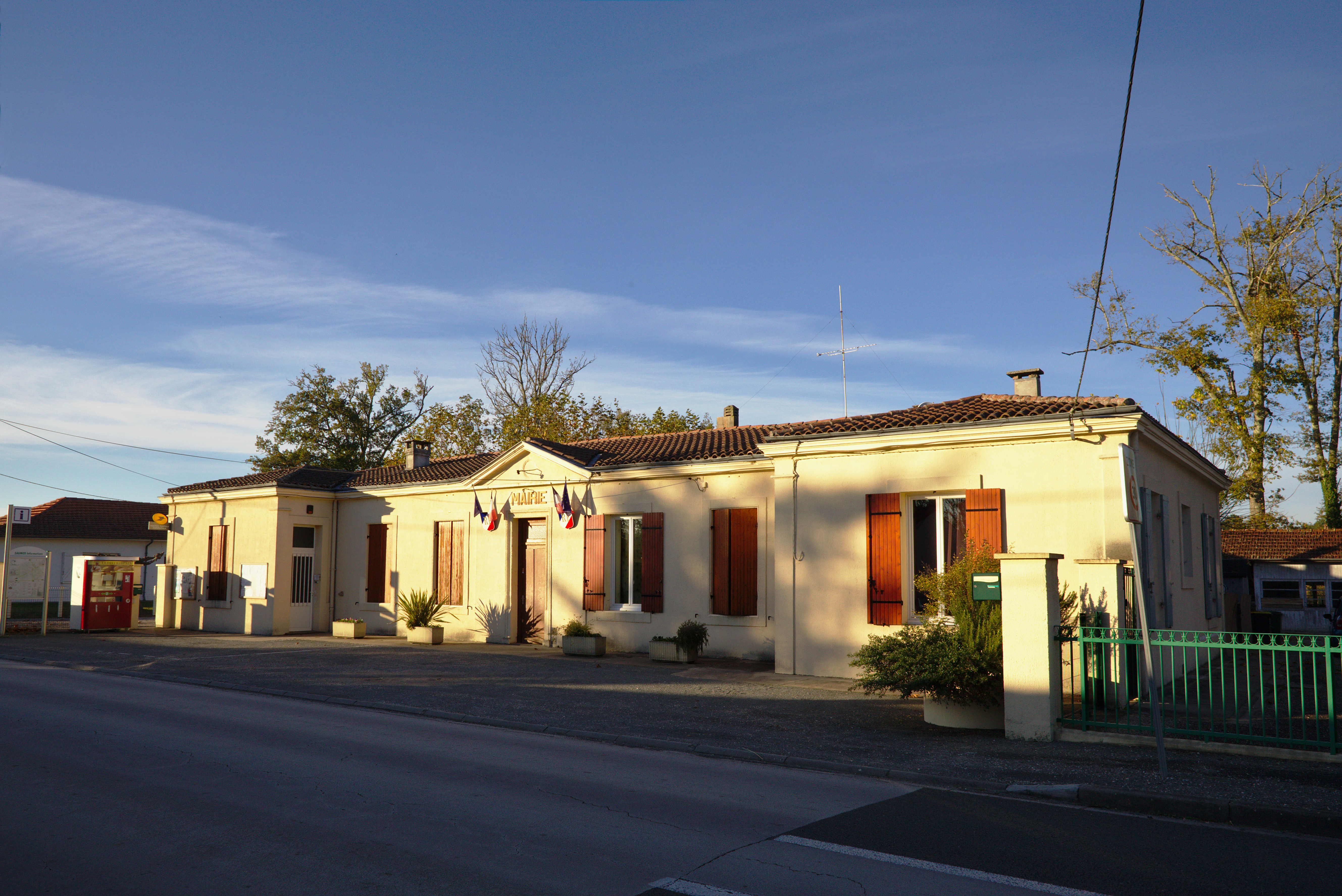 Mairie de Saumos